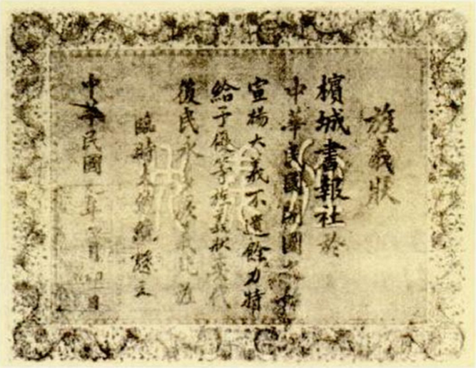 展示孙中山于1912年颁予槟城阅书报社的“旌义状”图像